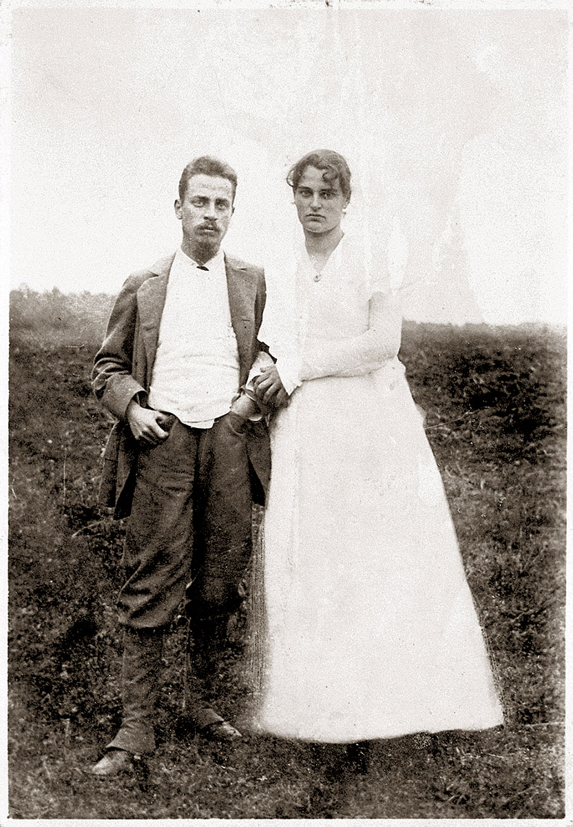 Rainer Maria Rilke und Clara Rilke-Westhoff kurz nach ihrer Hochzeit im Jahr 1901